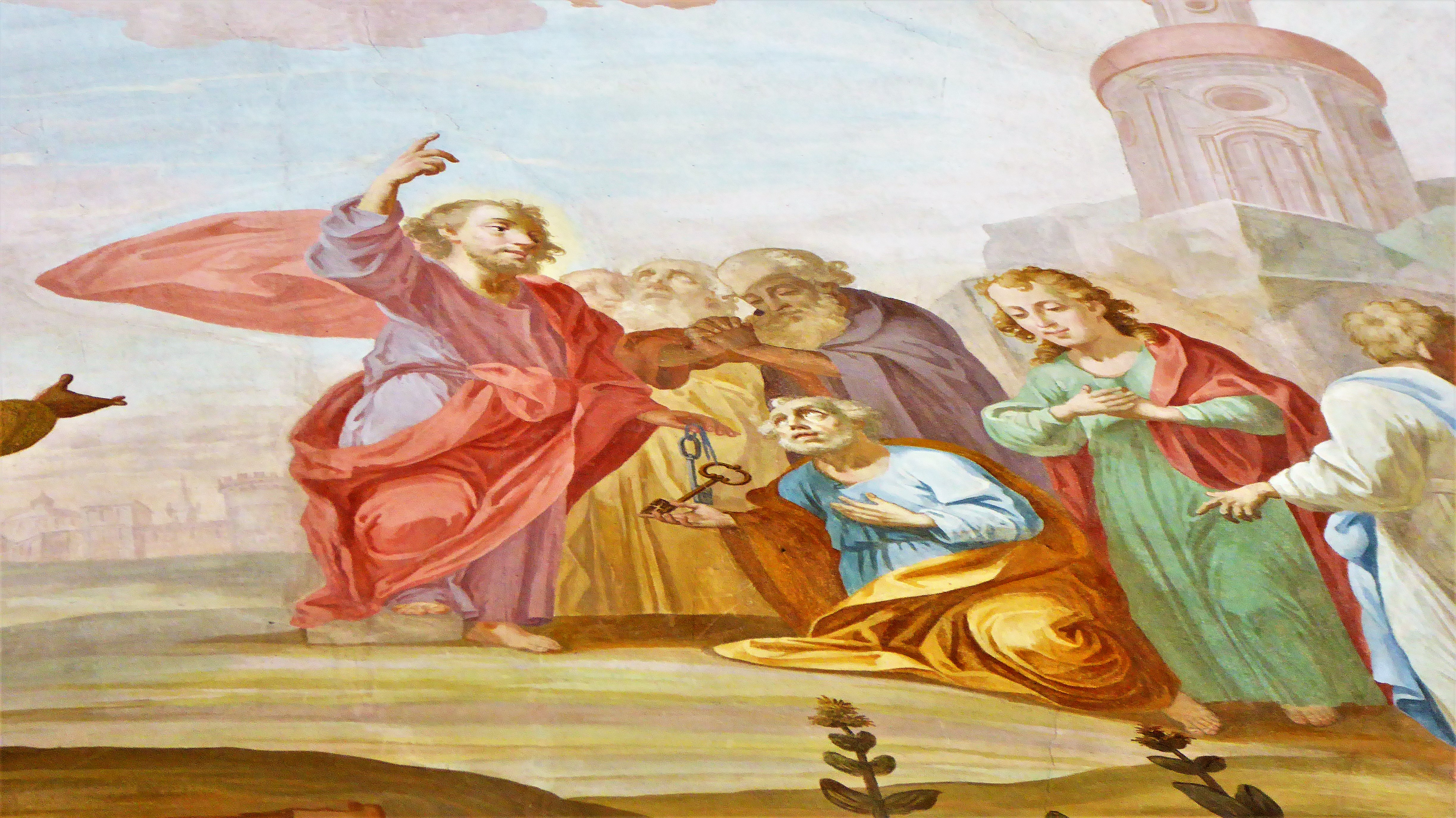 Jesus übergibt die Schlüssel für das Himmelreich an St.Petrus, Detail des Deckenfresco des späten Rokoko von Alois Gaibler aus KaufbeurenThis is a photograph of an architectural monument.